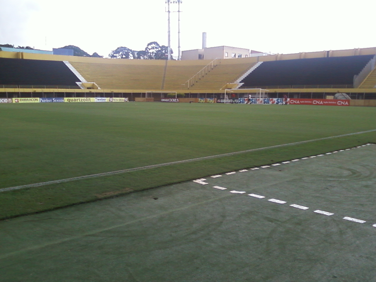 O Estádio Municipal Primeiro de Maio . Rua Olavo Bilac - Jardim Olavo Bilac, São Bernardo do Campo – SP